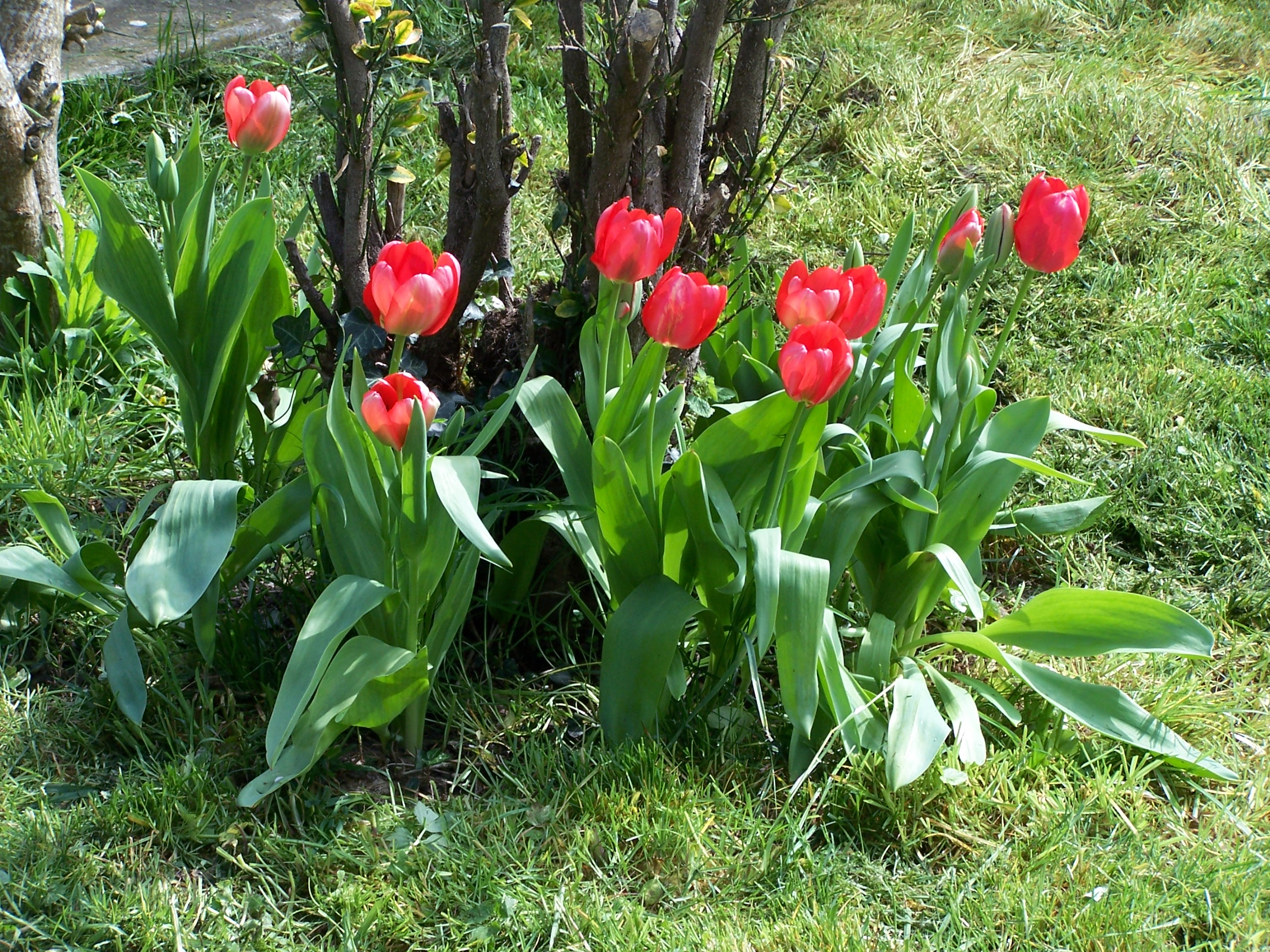 Tulipes rouges